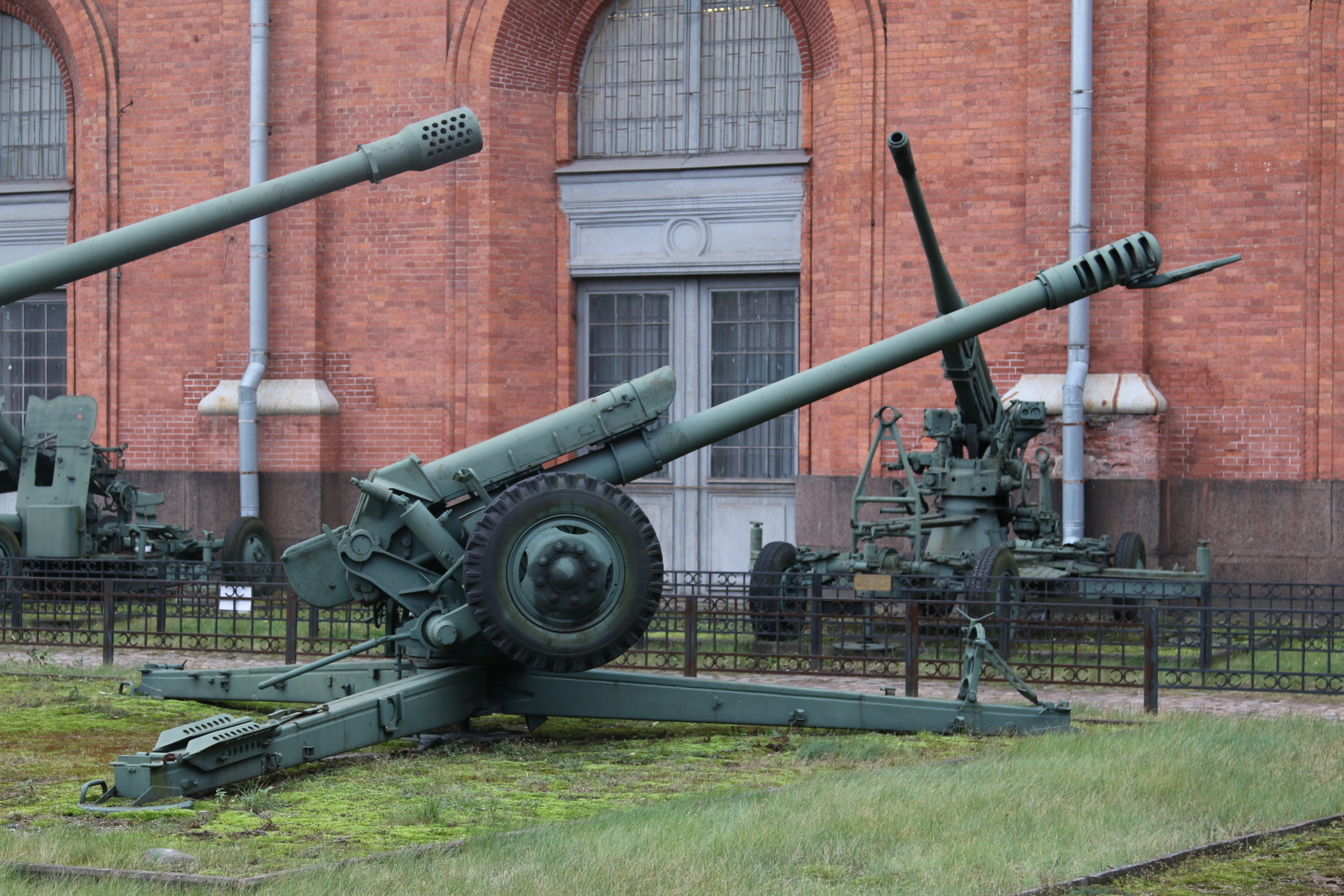 122 мм гаубица Д-30 (2А-18). Главный конструктор Ф.Ф. Петров.